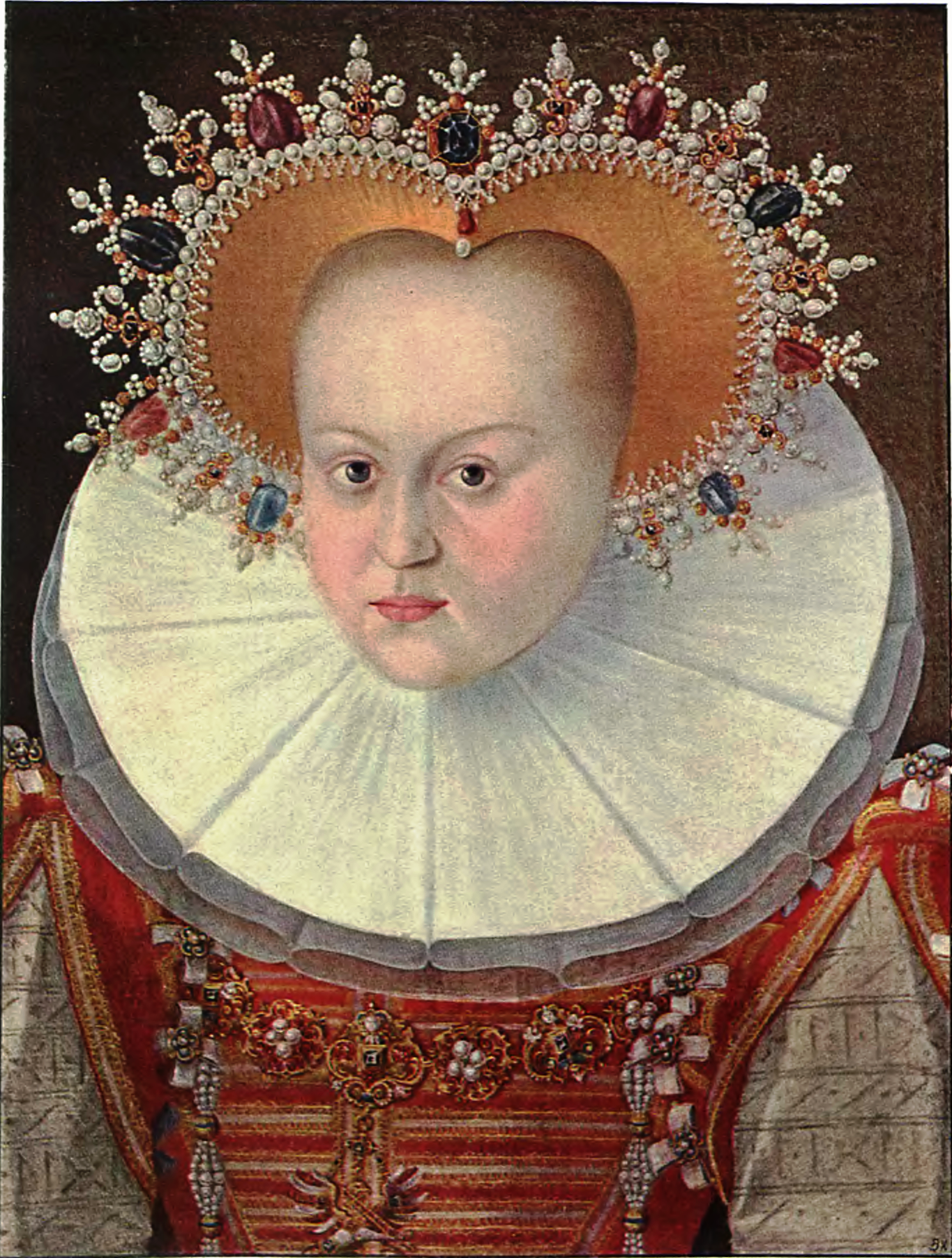 Ölgemälde von Erdmut von Brandenburg, Gemahlin von Herzog Johann Friedrich von Pommern.